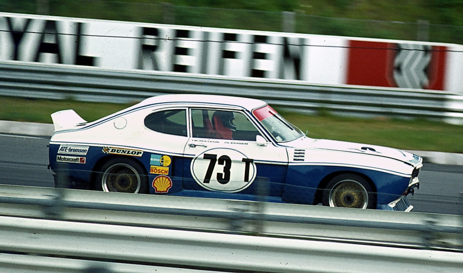 Dieter Glemser im Ford Capri 3100 RS beim 1000-km-Rennen auf dem Nürburgring, kurz vor der Einfahrt in die Südkehre.Fahrzeugdaten: V6-Zylinder-Motor, Hubraum 3412,5 cm³, 415 PS bei 7000/min, 2 obenliegende Nockenwellen je Zylinderbank, 4 Ventile pro Zylinder, Trockensumpfschmierung; vollsynchronisiertes ZF-5-Gang-Getriebe; Vorderachse einstellbare Querlenker und Druckstreben, Schraubenfedern, Stabilisator; Hinterachse: Starrachse mit 4 Längslenkern und Wattgestänge, Kunststoff-Blattfeder, Federbeine; Scheibenbremsen, Durchmesser vorn 302 mm, hinten 292 mm; Zahnstangenlenkung und Sicherheitgslenksäule; Reifen vorn 275/600–16, hinten 350/625–16; Tankinhalt 120 Liter; Radstand 2560 mm, Spur vorn 1470 mm, hinten 1390 mm, Länge 4262 mm, Breite 1791 mm, Höhe 1284 mm; Gewicht einschließlich Überrollkäfig und Feuerlöscher 1040 kg; Beschleunigung 0–100 km/h in 4,2 Sekunden, Höchstgeschwindigkeit ca. 280 km/h